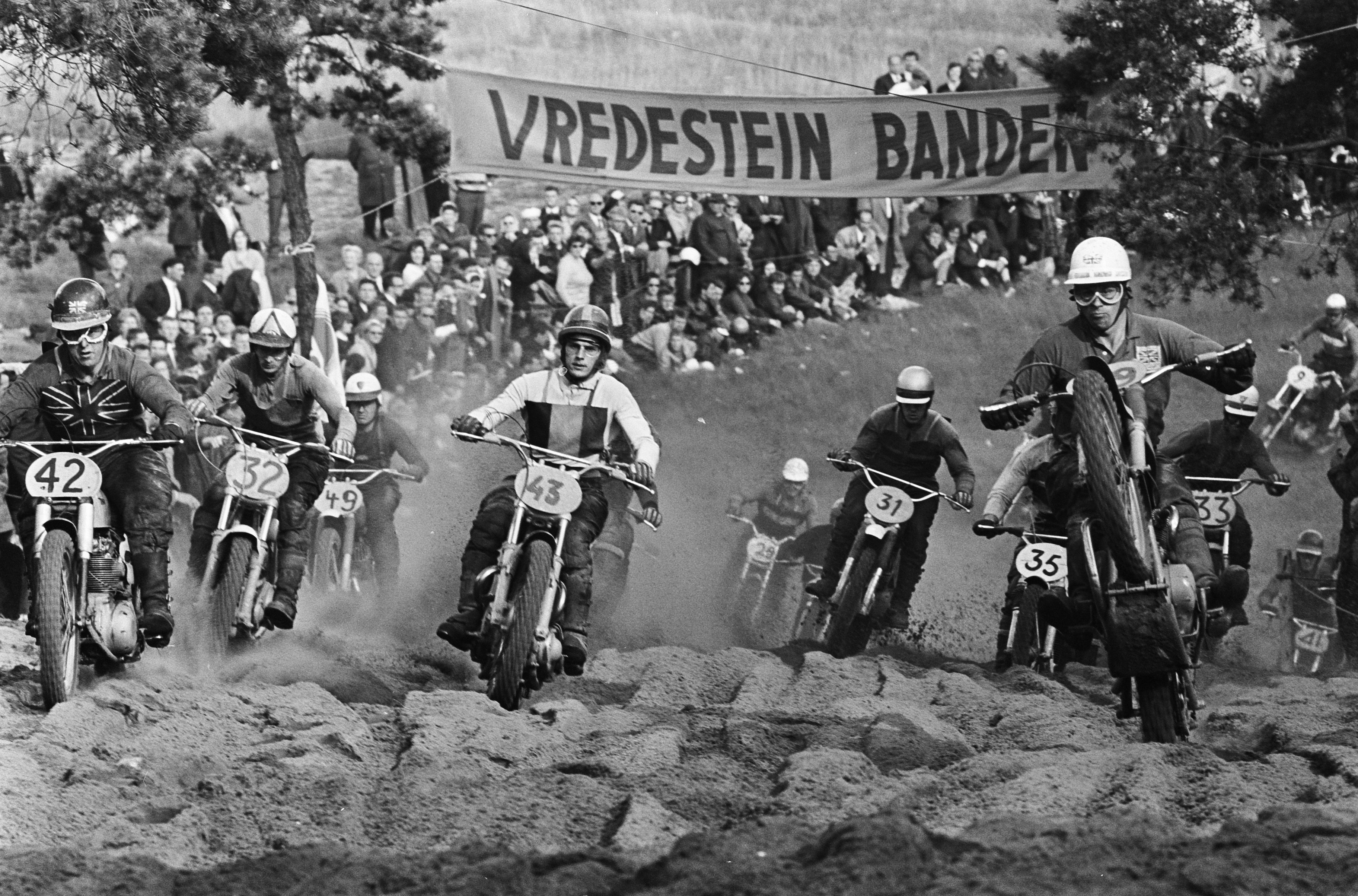 Collectie / Archief : Fotocollectie Anefo Reportage / Serie : [ onbekend ] Beschrijving : Motorcross in Bergharen, de start van de 500 cc Annotatie : Met nr. 43 Jef Theeuwissen uit België. Nr. 32 Jan Clynk Datum : 25 juli 1965 Locatie : Bergharen Trefwoorden : motorcross, sport Fotograaf : Koch, Eric / Anefo Auteursrechthebbende : Nationaal Archief Materiaalsoort : Negatief (zwart/wit) Nummer archiefinventaris : bekijk toegang 2.24.01.05 Bestanddeelnummer : 917-9960 Reacties Geplaatst door Anoniem op 26 mei 2011 - 19:50. nummer 43 is jef theeuwissen